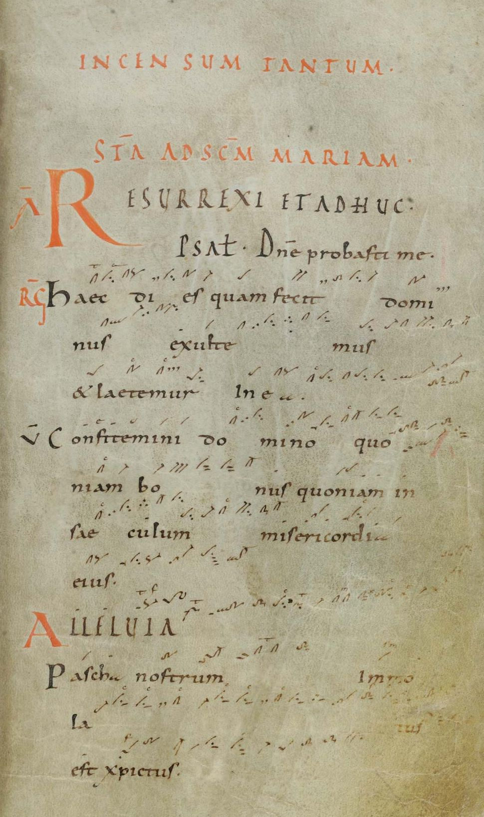 Seite 107 des Codex Sangallensis 359 - Resurrexi